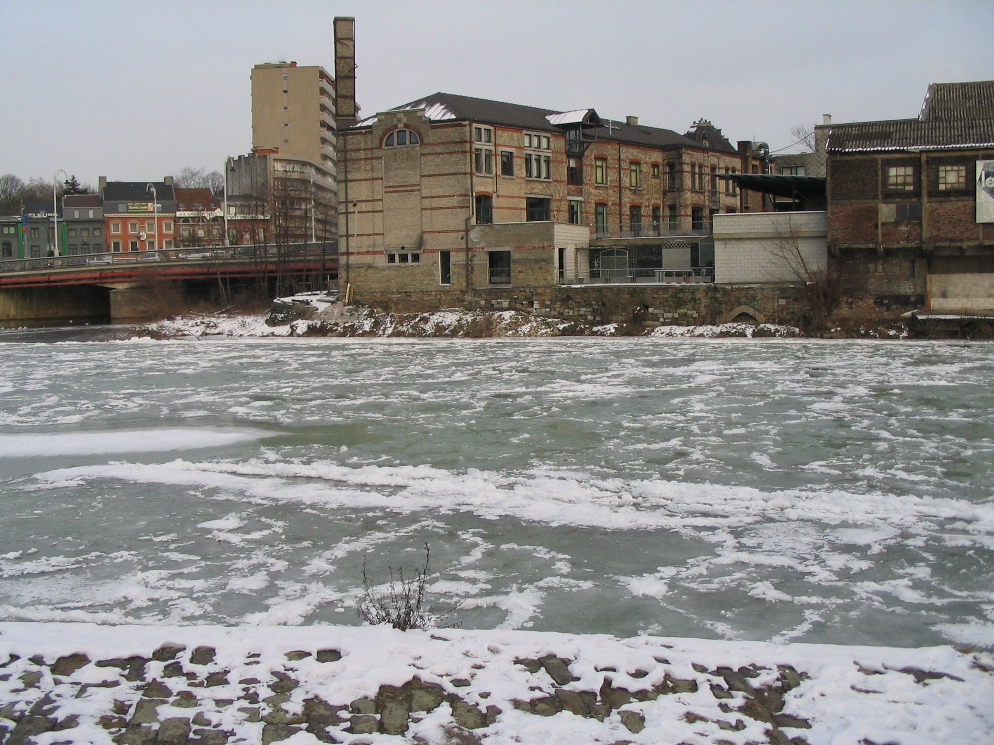 Ourthe prise par les glaces à Angleur lors de l'hiver 2011-2012